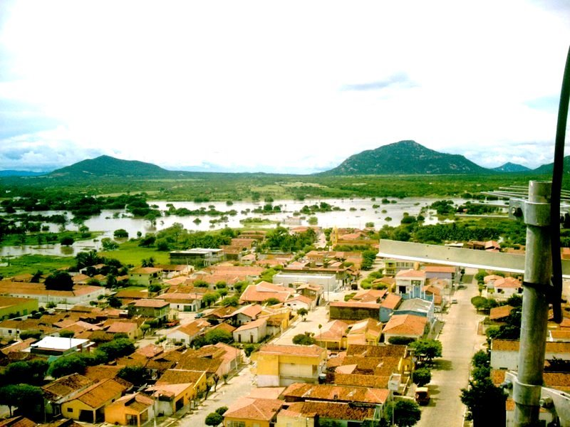 Vista da cidade de Paulista